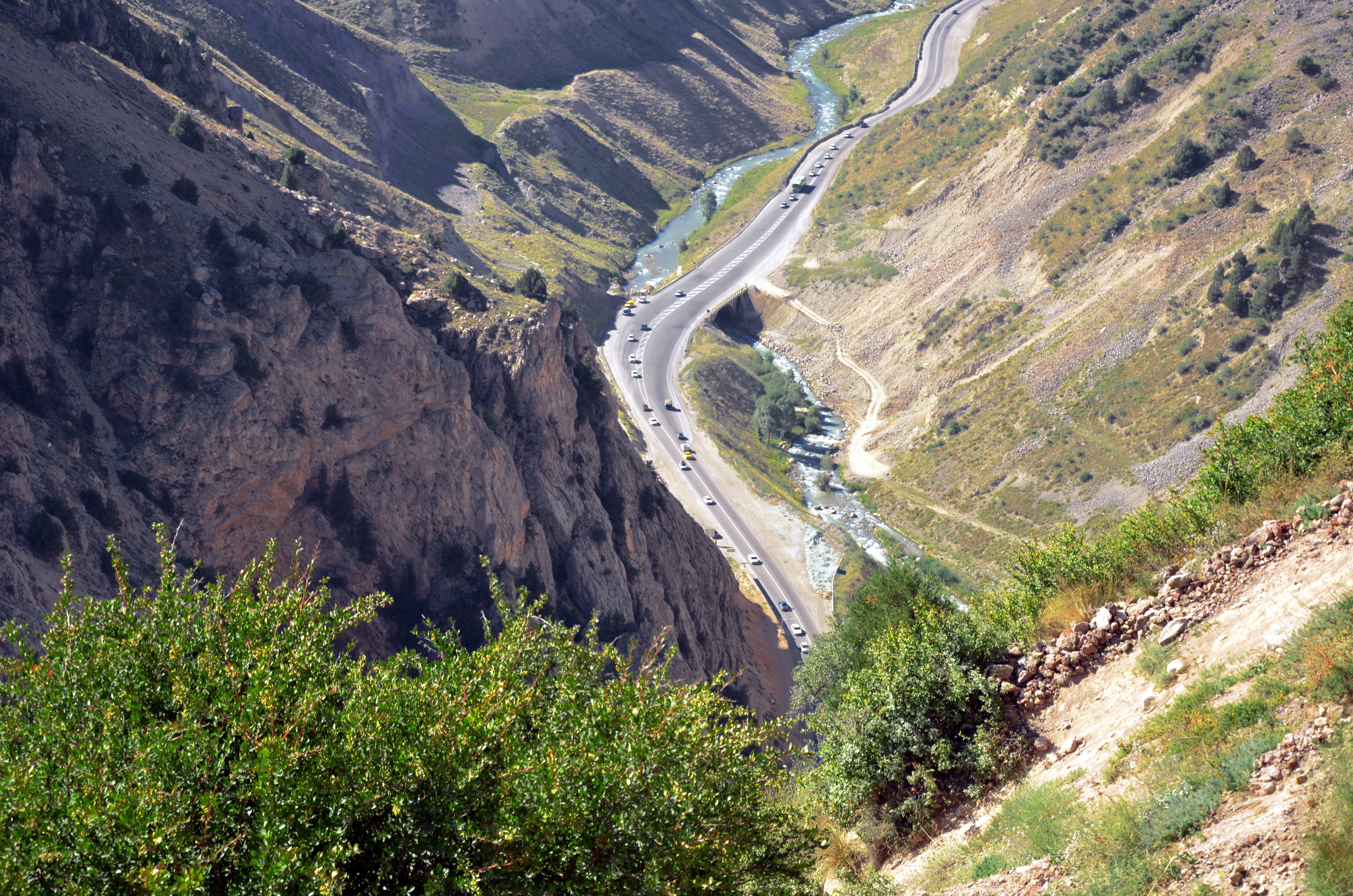 Mazandaran - Haraz road